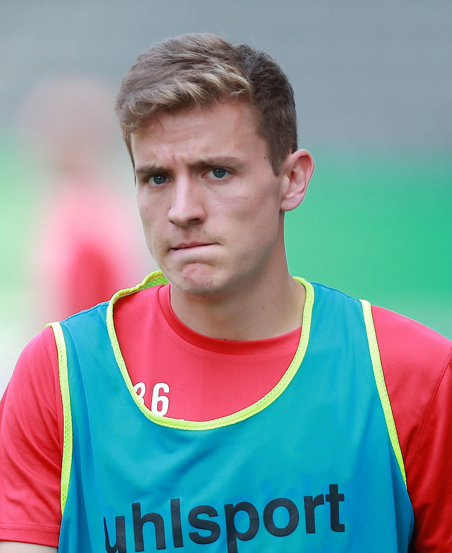 DFB-Pokal 2018/19, 1. Hauptrunde: BFC Dynamo gegen 1. FC Köln 1:9 (1:4): Niklas Hauptmann